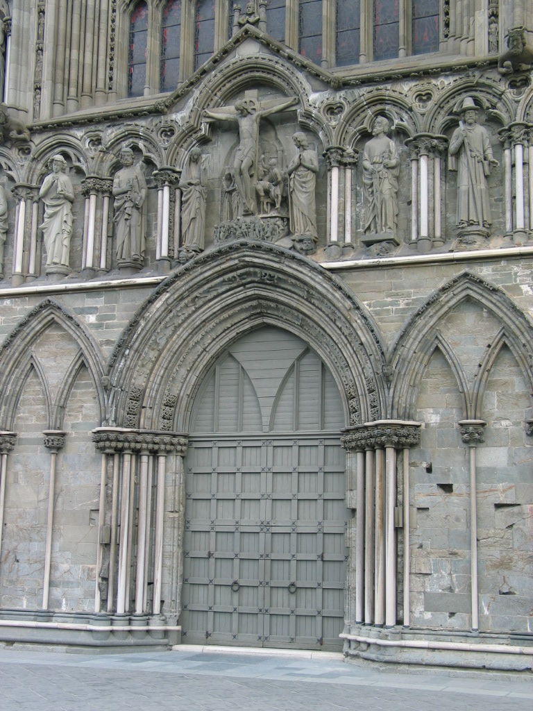 Nidarosdomen in Trondheim